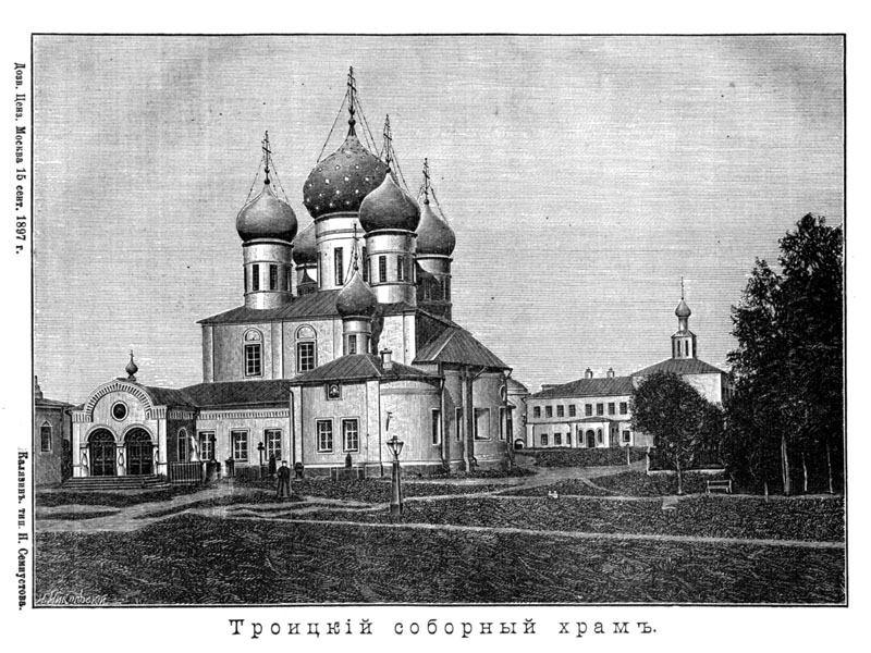 Troizksij Church in Kaljazin Monastery.